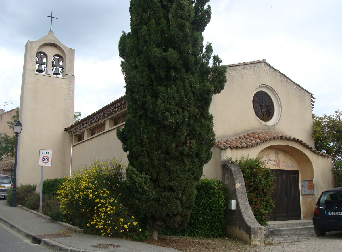 L'église de Belcodène (Bouches-du-Rhône)